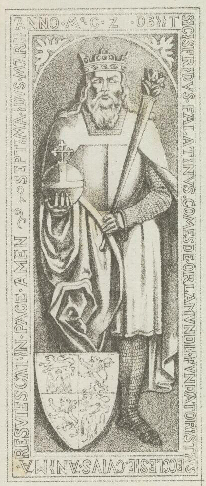 Bildunterschrift: Grabstein des Siegfried II. von Orlamuende / Pfalzgrafen / gest. 11. März 1124 / begraben in Kloster Herrenbreitungen